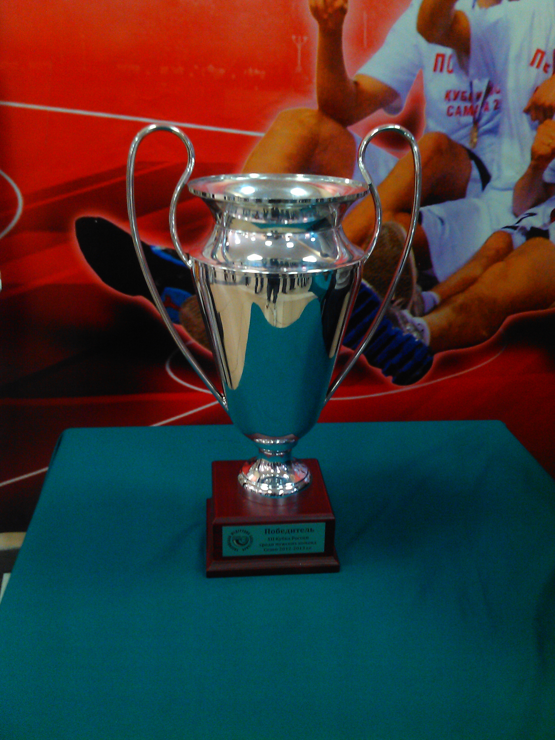 Кубок России по баскетболу 2012-2013 в спортивном комплексе МТЛ-Арена в Самаре.